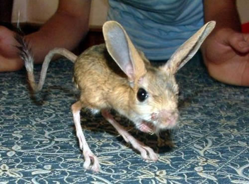 Arap tavşanı.